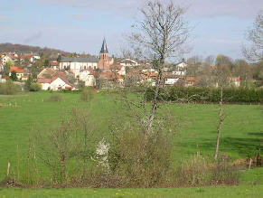 Village de Bavilliers (Territoire de Belfort)vu depuis la coulée verte. Photo prise le 16 avril 2004 par LP90. Licence GFDL LP90 avril 2004